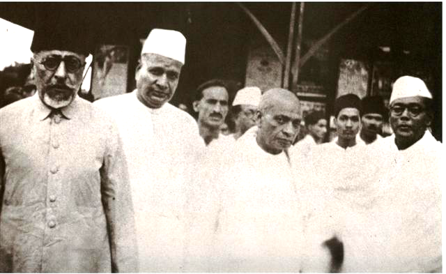 At Wardha Railway Station, Maulana Azad, Acharya Kripalani, Sardar Patel, Subhash Bose